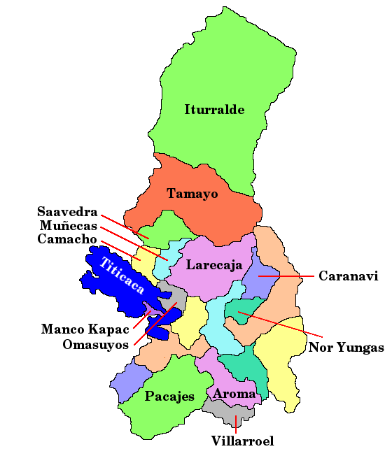 Mapa del departamento de La Paz en Bolivia